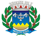 Português do Brasil: Brasão de Monte Sião - MG